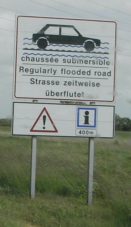 Signalisation préventive du passage du Gois - Île de Noimoutier en Vendée (85) France.